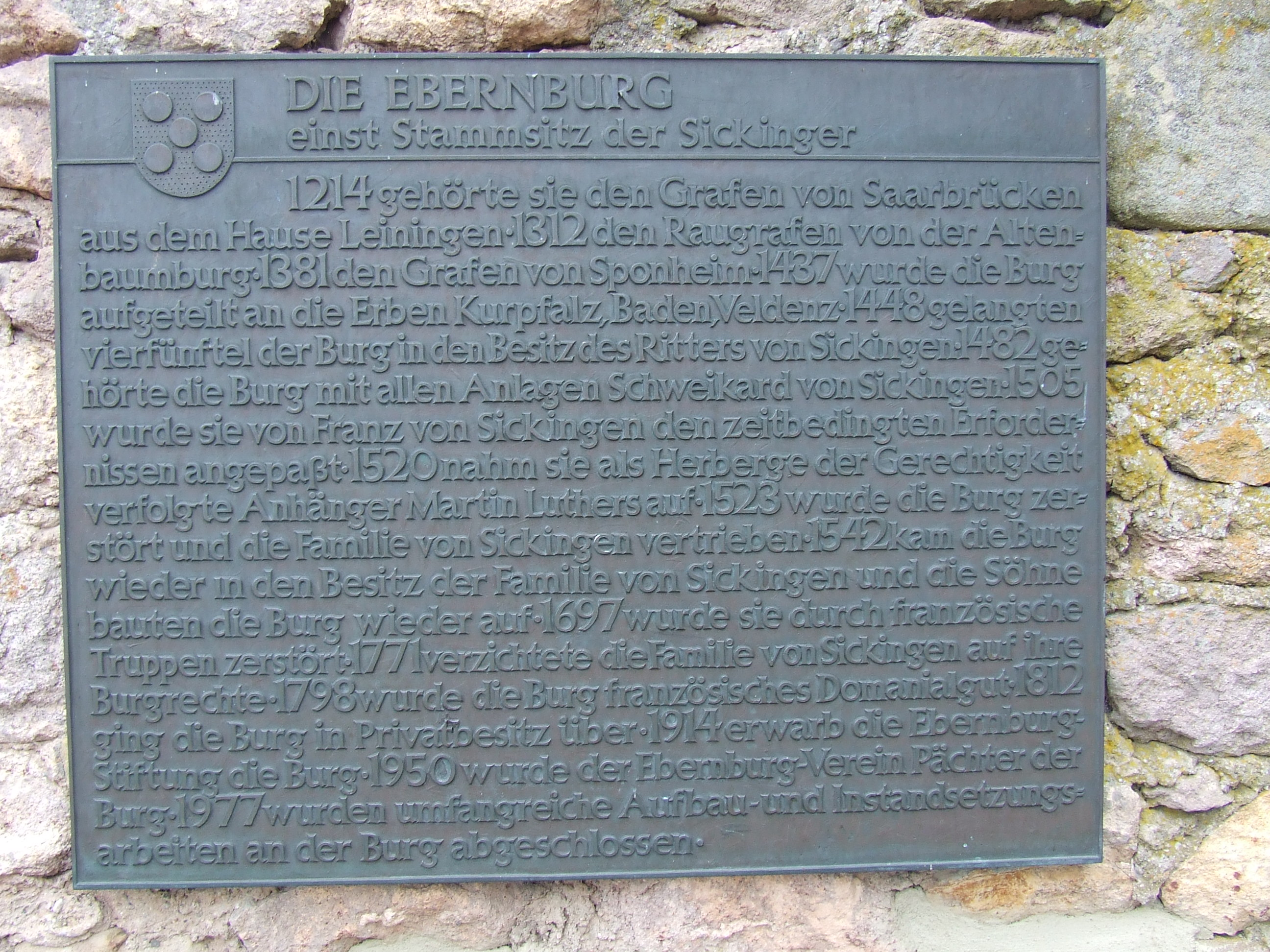 Geschichtstafel über die Ebernburg